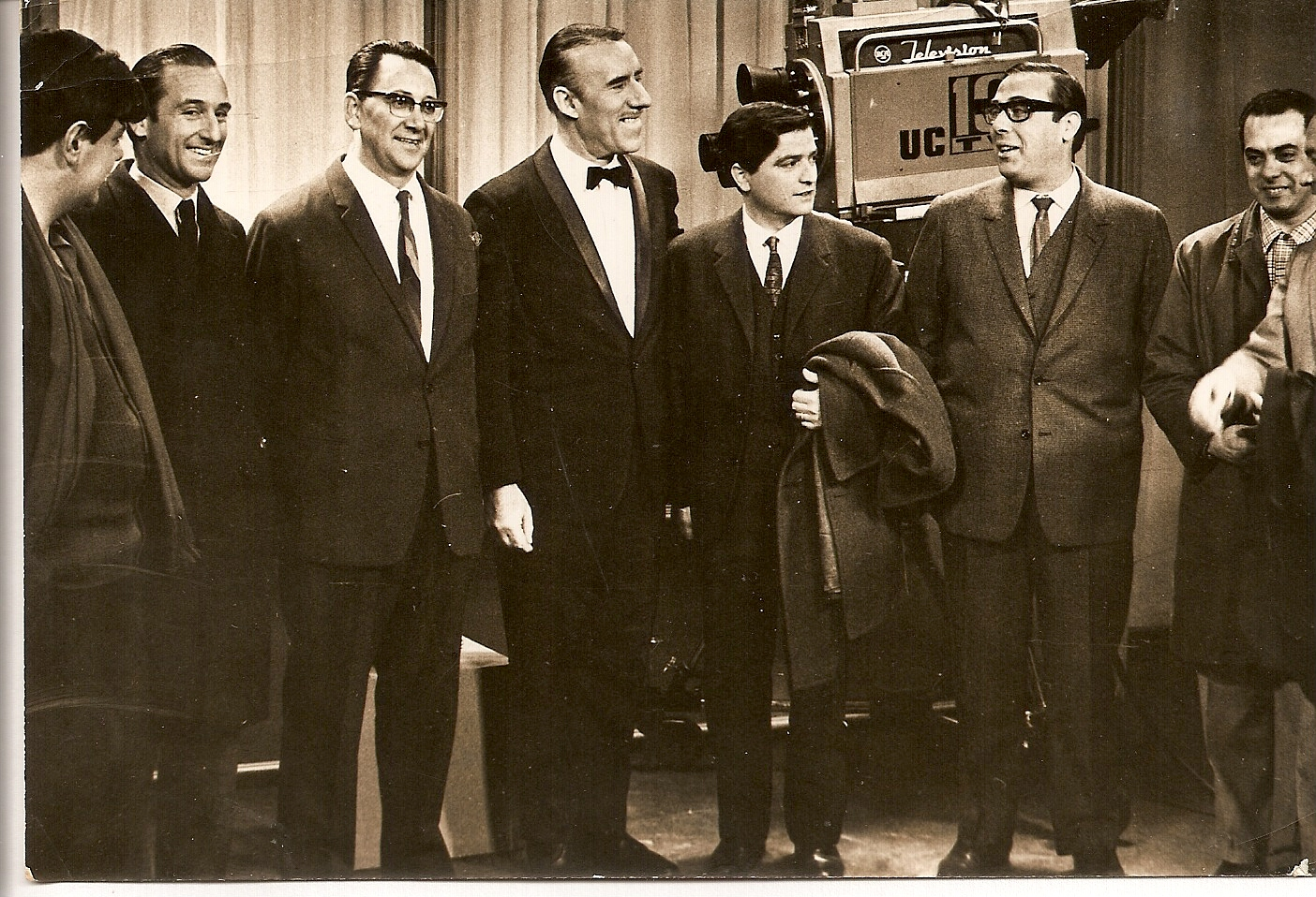 David Raisman, Productor Ejecutivo de la Pontificia Universidad Católica de Chile, junto a Edmundo Rivero y autoridades del Canal 13 de la Pontificia Universidad Católica de Chile